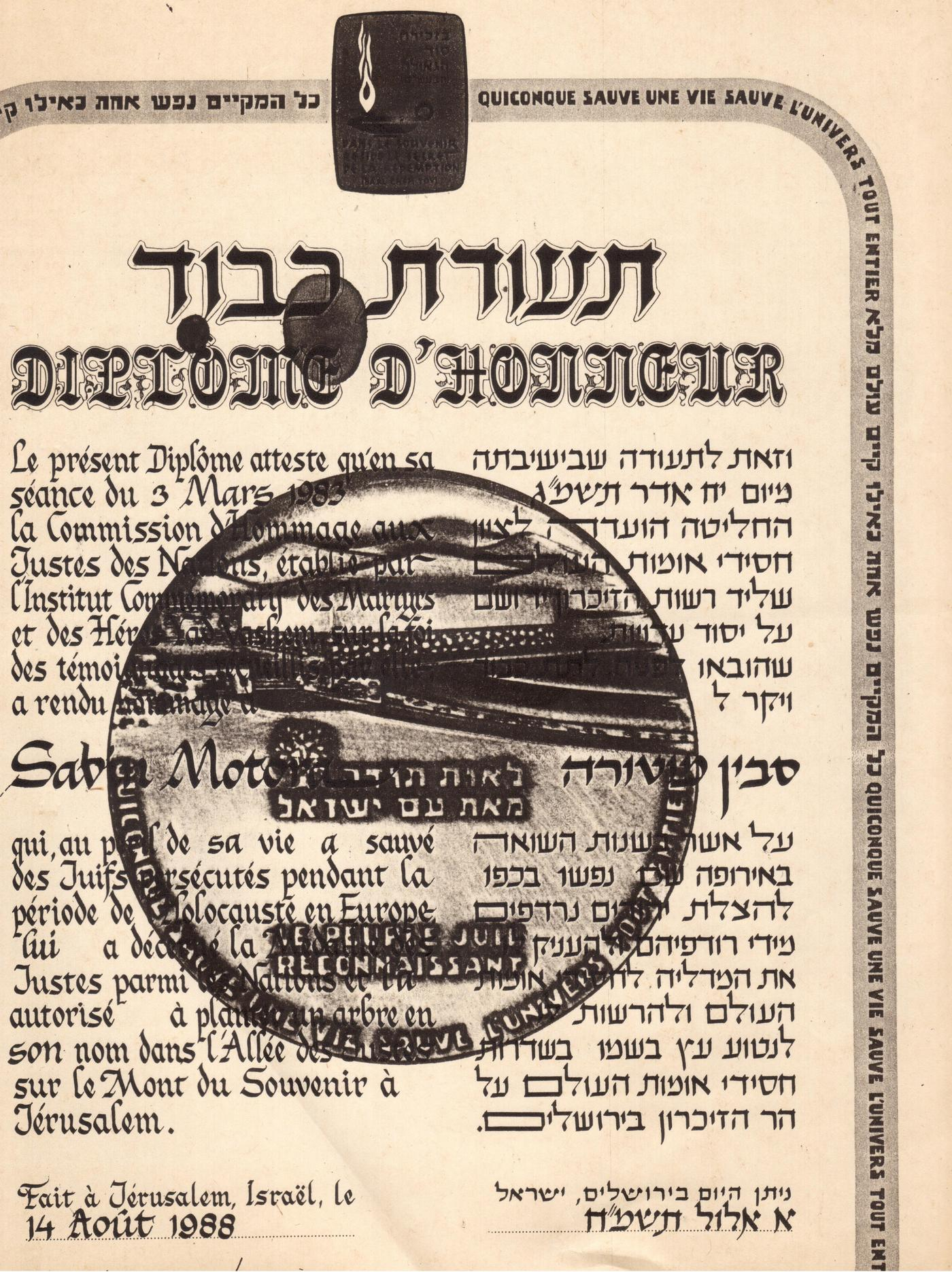 Diploma Drepti intre Popoare - Yad Vashem